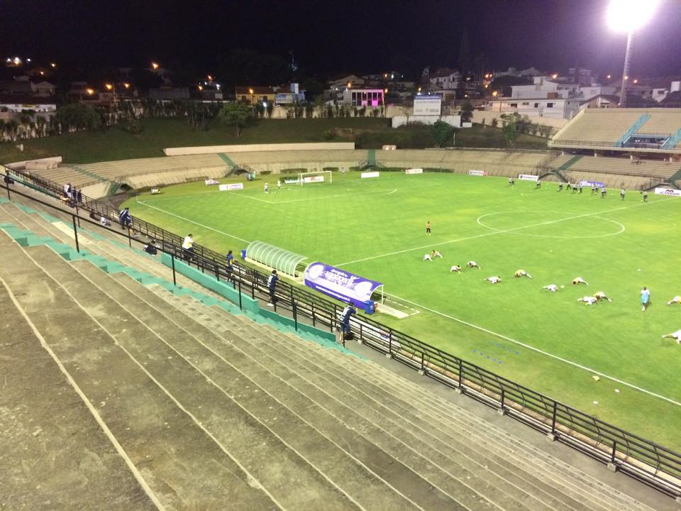 Visão da arquibancada superior do Estádio Municipal Walter Ribeiro